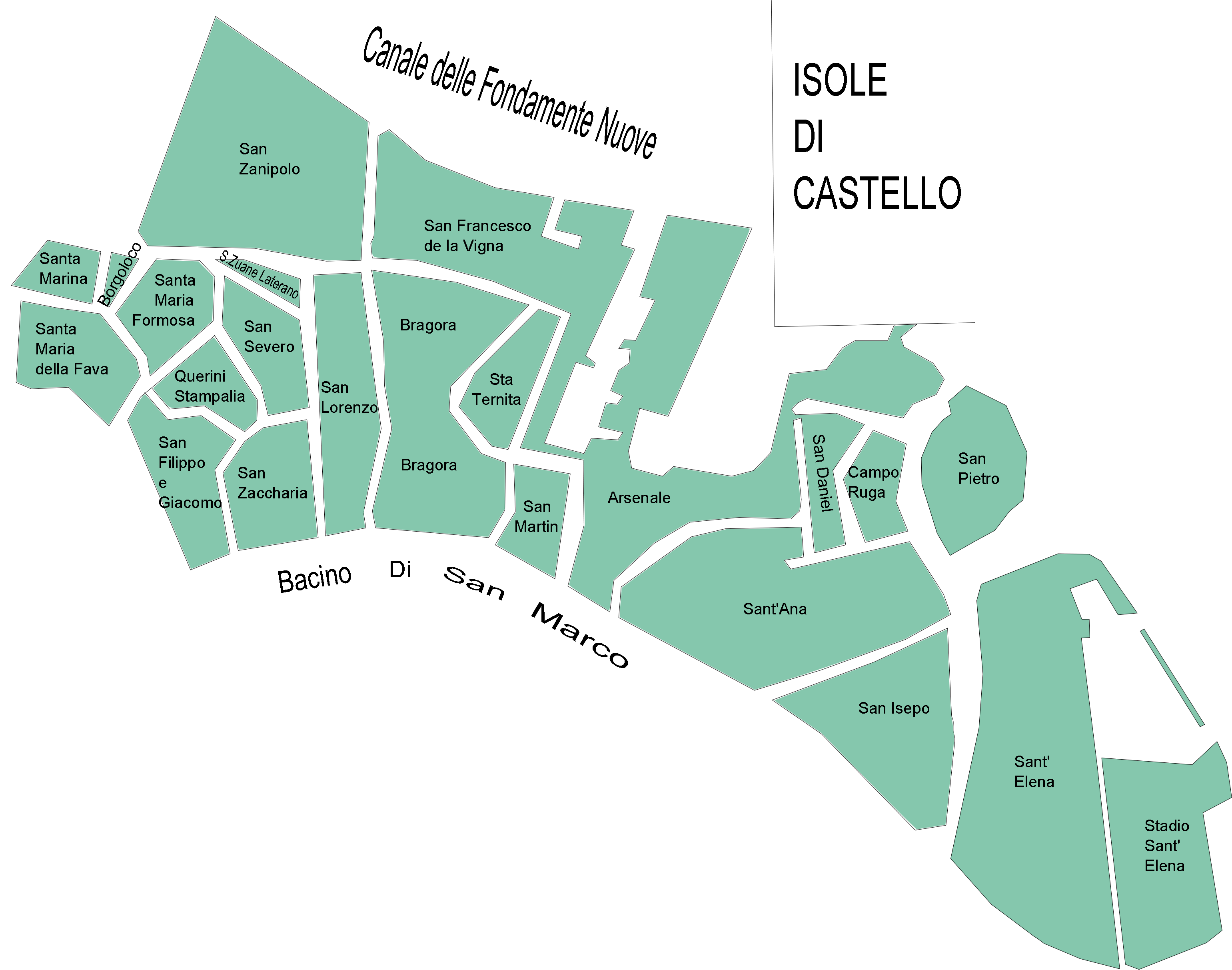 iles du sestiere de castello venise